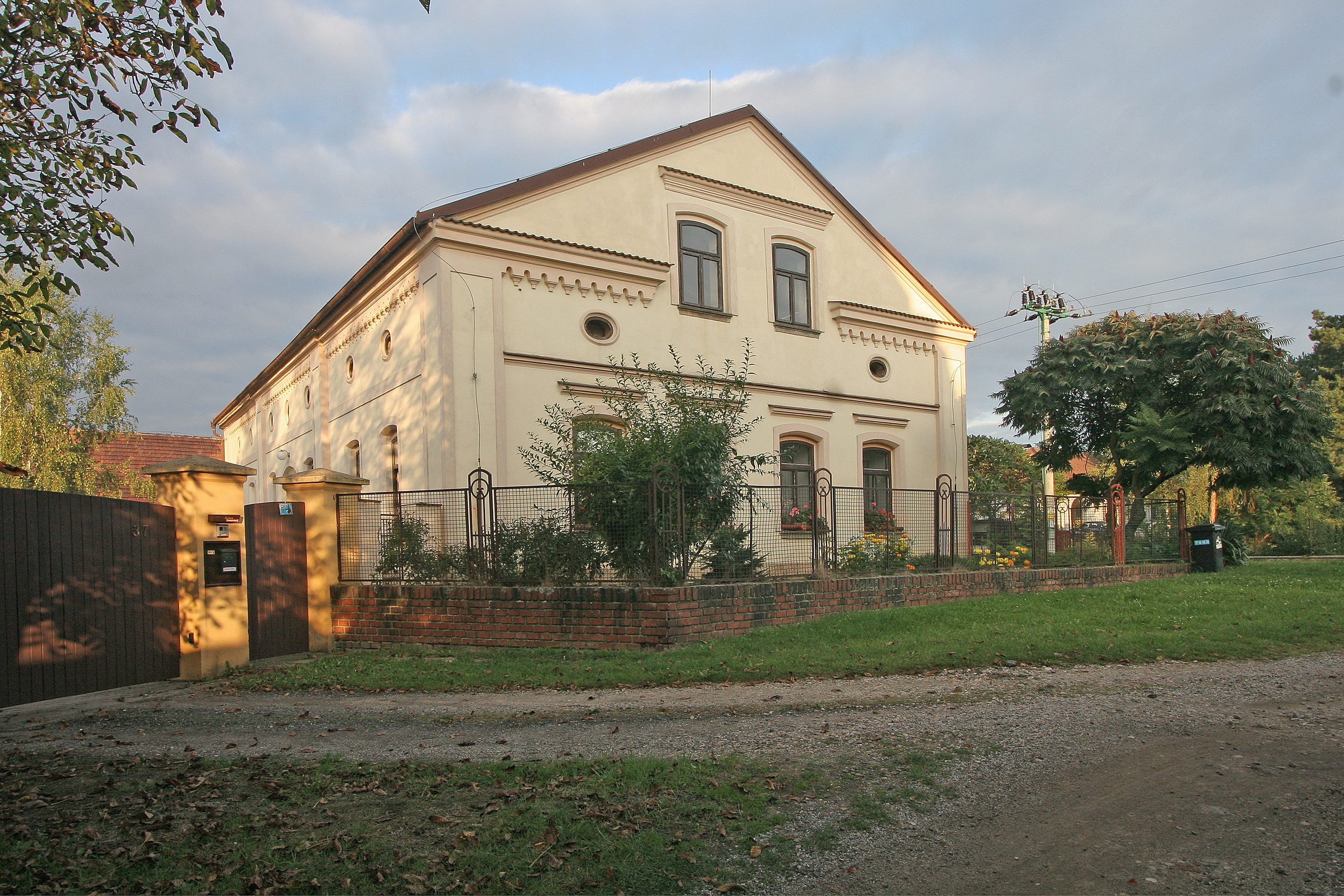 Osice čp. 37.